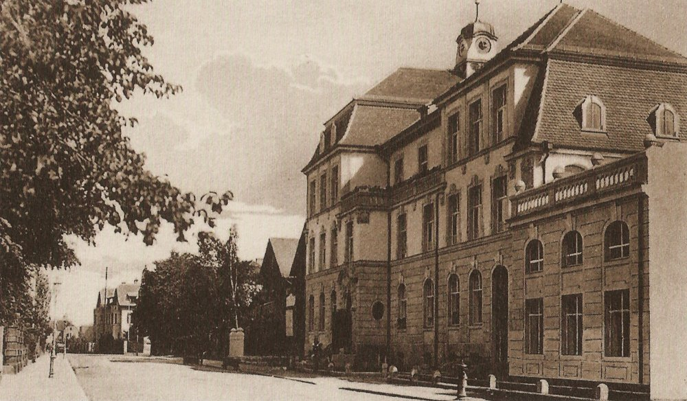 Erlangen. Marie-Therese-Gymnasium in der Schillerstraße 12. Das Jugendstil-Gebäude wurde 1909 von der Städtischen höheren weiblichen Bildungsanstalt bezogen. 1914 erfolgte die letzte Umbenennung in Marie-Therese-Gymnasium. Heute handelt es sich um ein Städtisches Neusprachliches und Mathematisch-Naturwissenschaftliches Gymnasium, in dem seit 1950 auch männliche Schüler zugelassen sind.